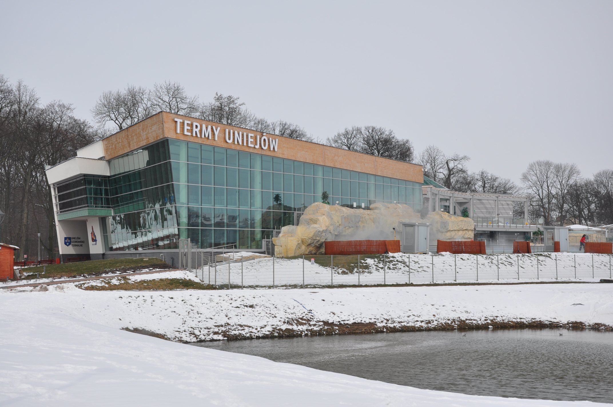 Uniejów; kompleks termalno basenowy.